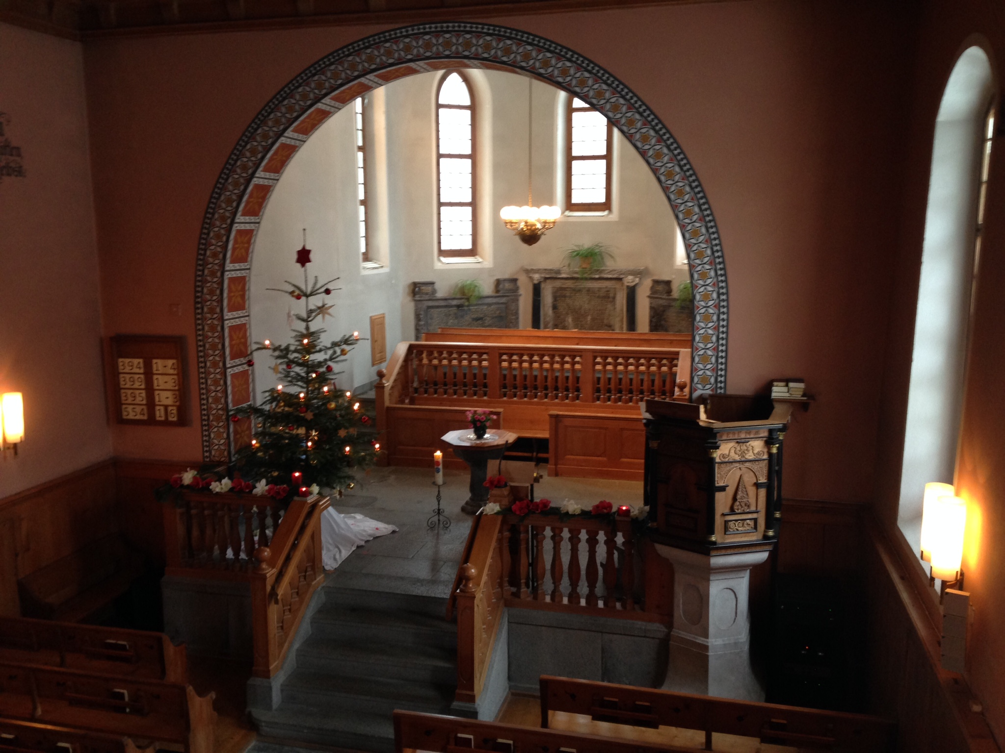 Blick von der Empore in den Chor der reformierten Kirche in Igis GR